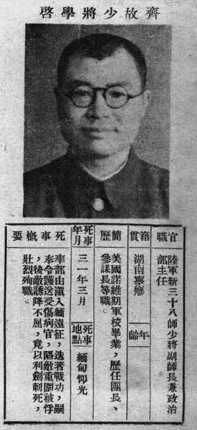 抗戰軍人忠烈錄第一輯中的烈士遺像